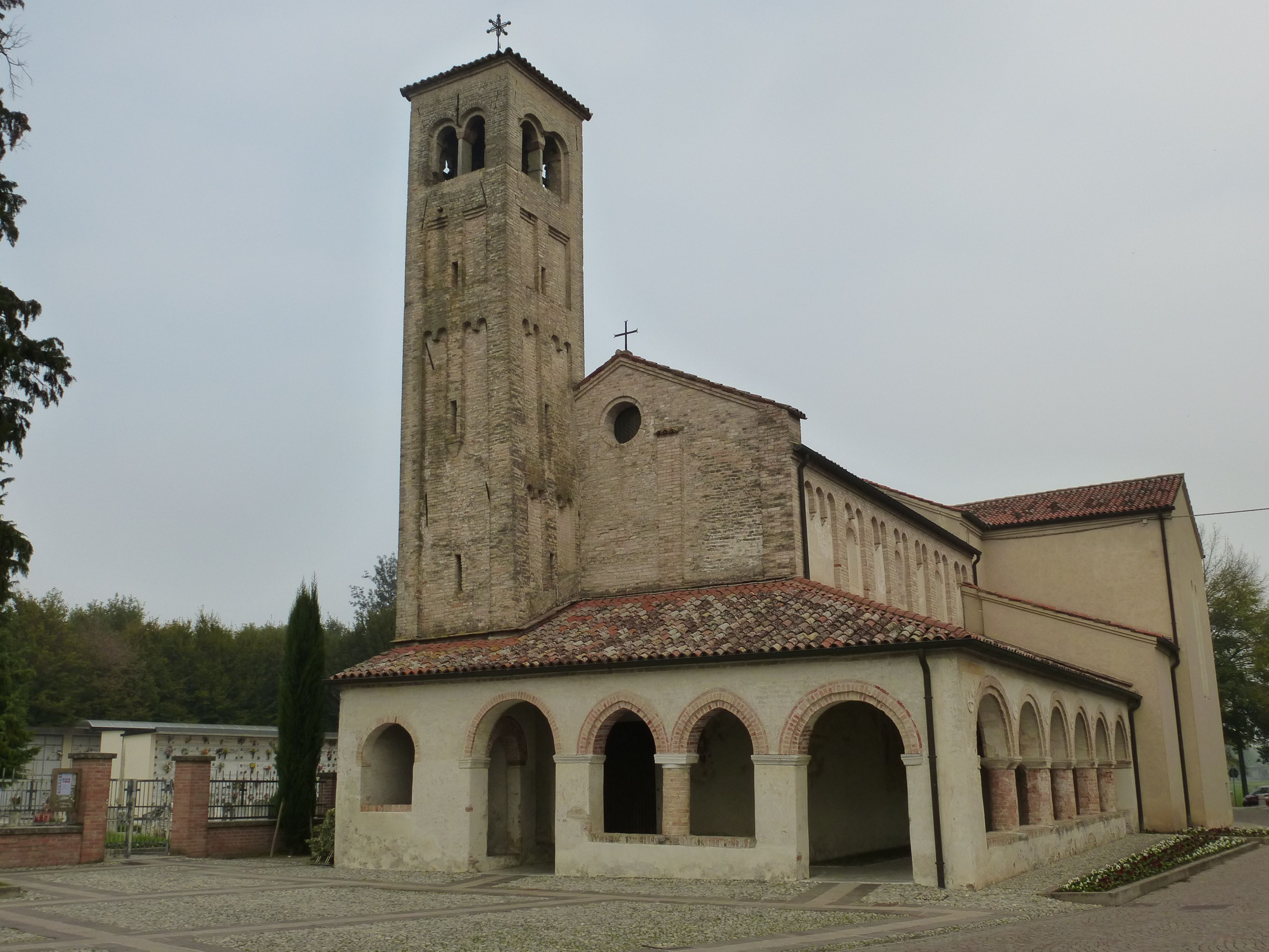 Templerkirche im Ortsteil Tempio von Ormelle